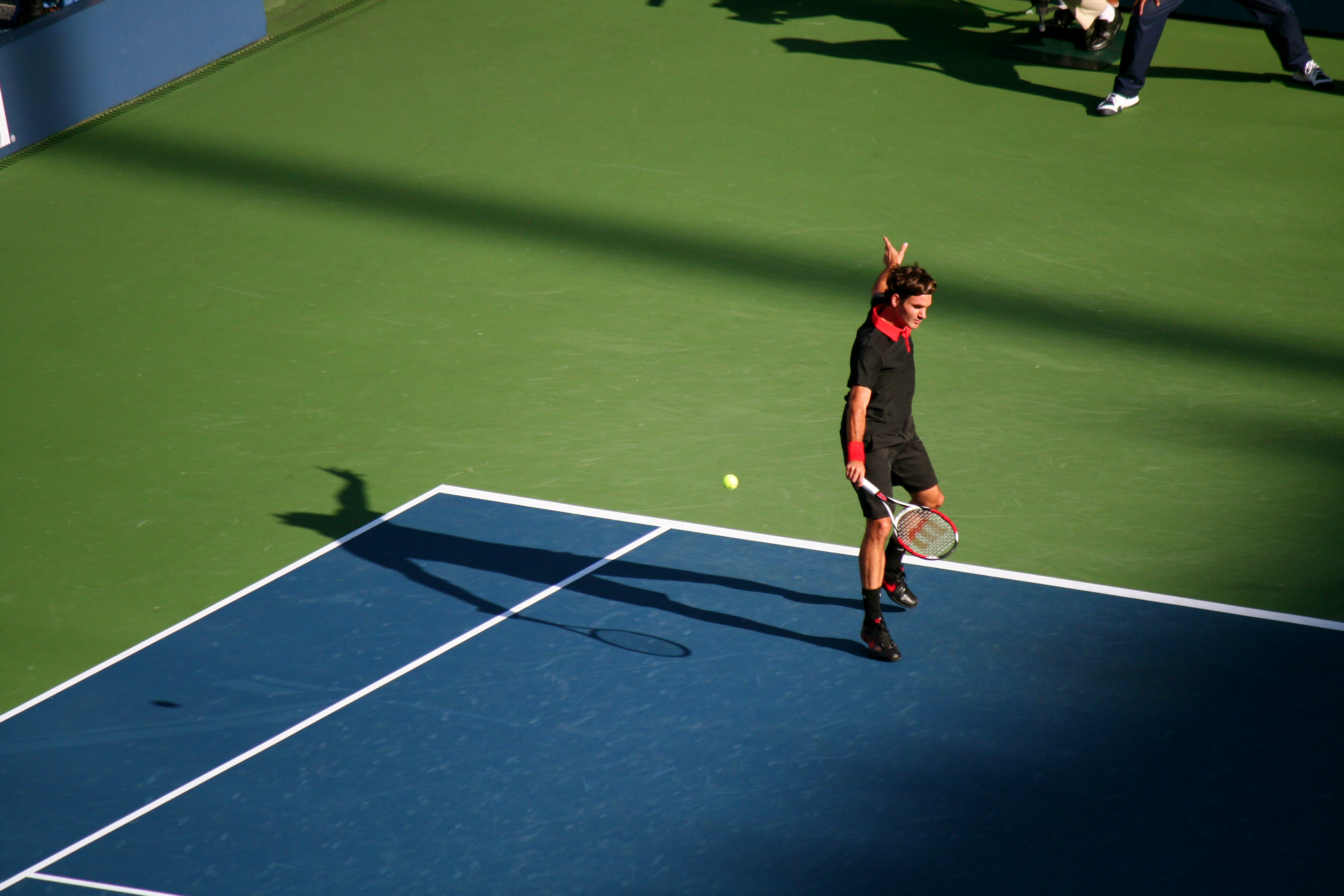 Roger Federer